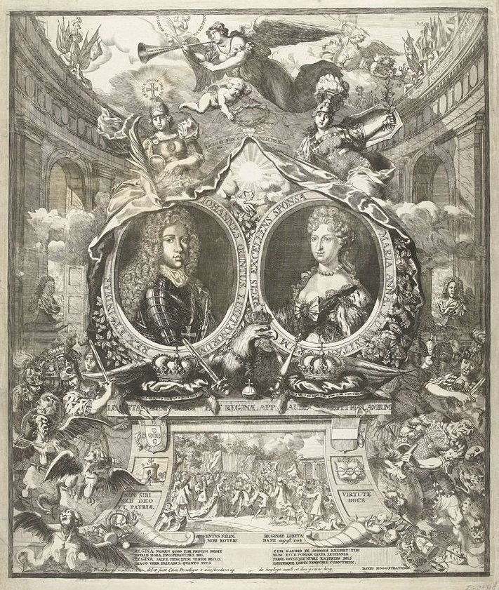 Huwelijksprent voor koning Johan V van Portugal, 1708